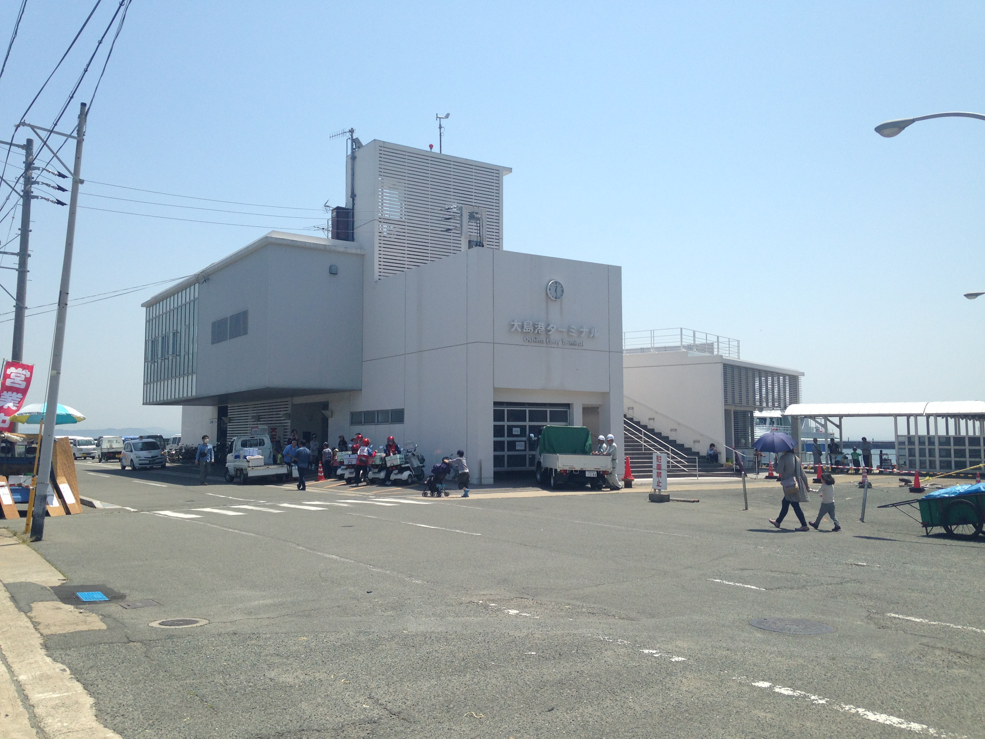 筑前大島・大島港ターミナル